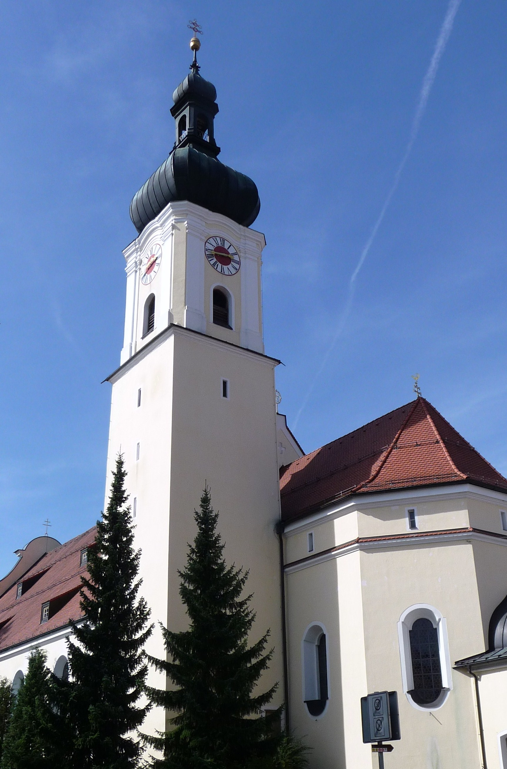 Die Pfarrkirche Maria Himmelfahrt in Grafenau